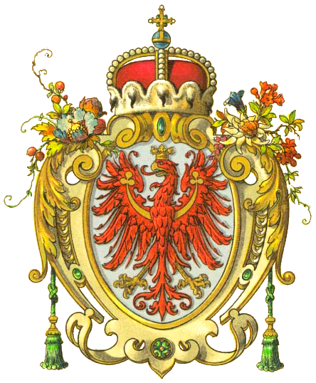 Wappen der Gefürsteten Grafschaft Tirol